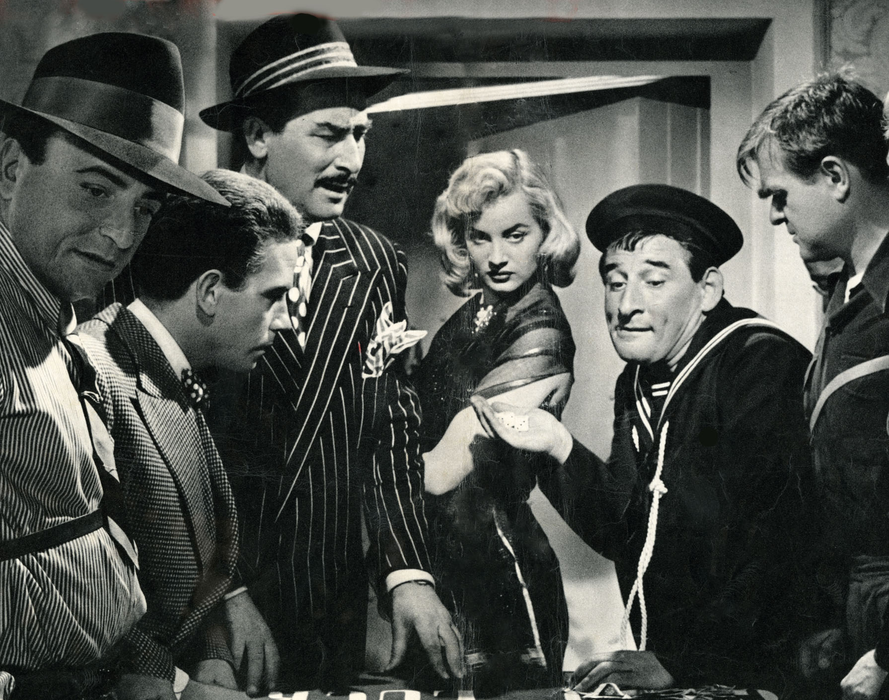 foto di scena del film Rascel-Fifi Licensing 1955